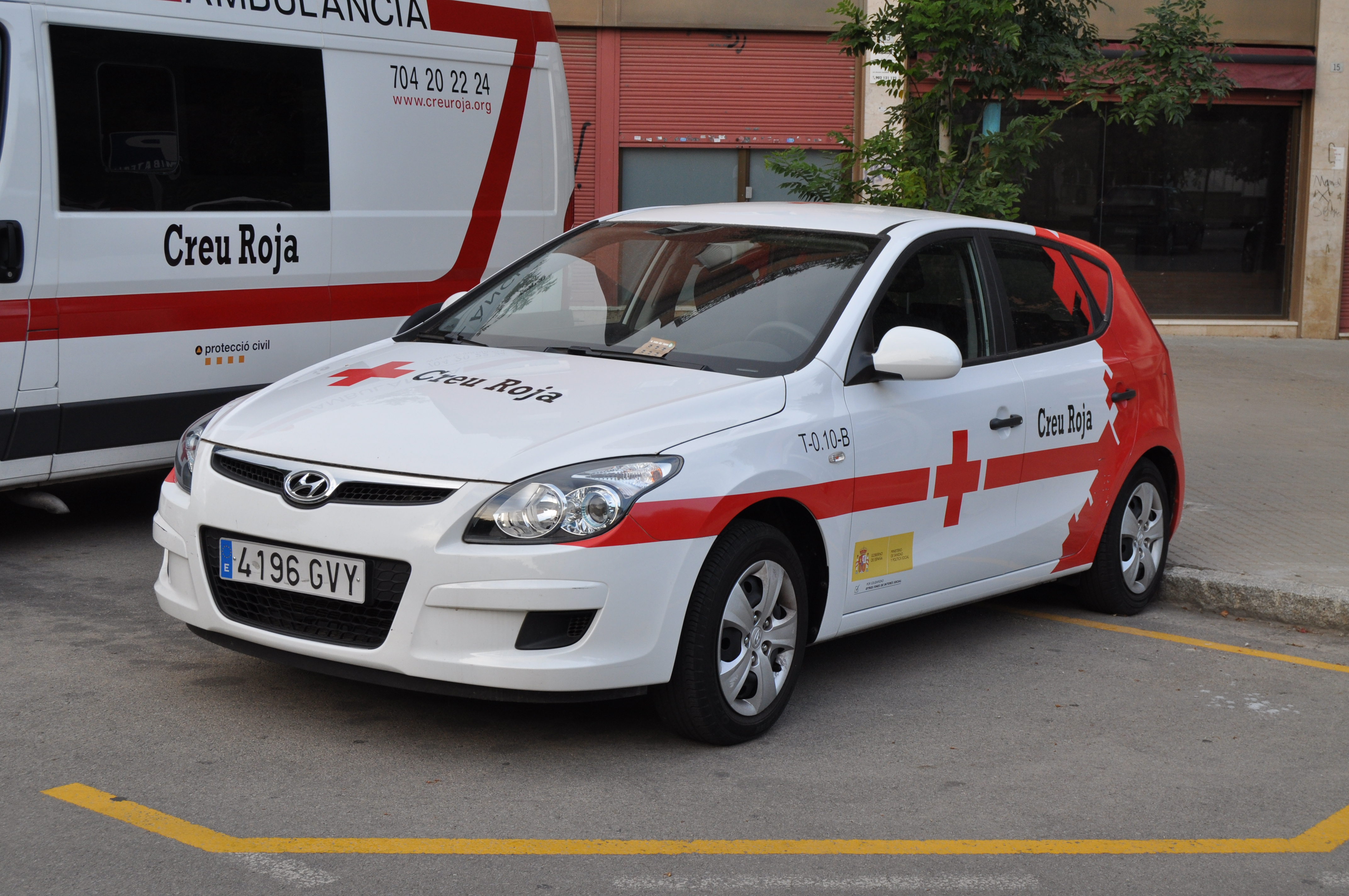 Mollet del Vallès: Vehículos de la Cruz Roja Española en la esquina Pablo Picasso / Hipòlit Lazaro.